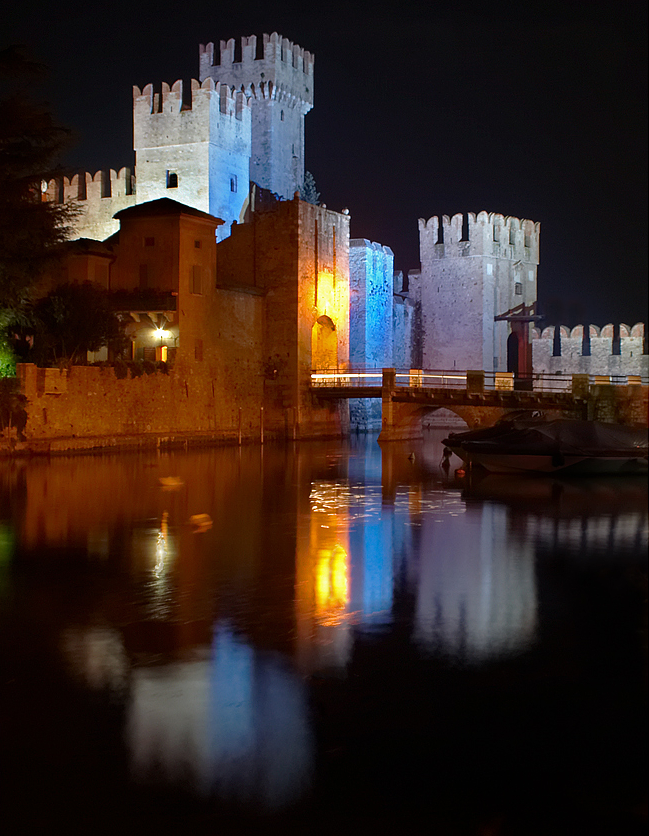 Notturno del castello di Sirmione